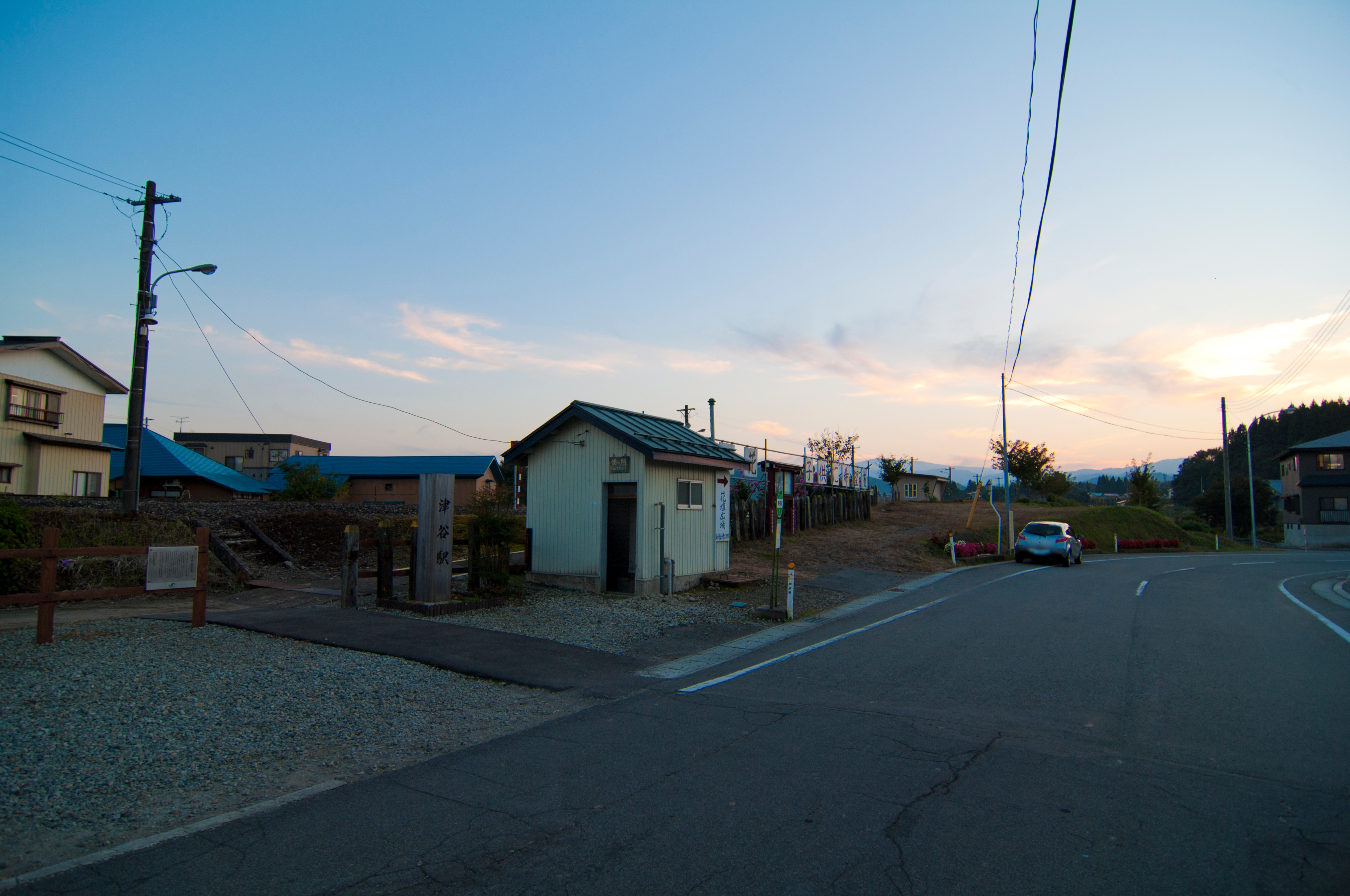 東日本旅客鉄道陸羽西線津谷駅